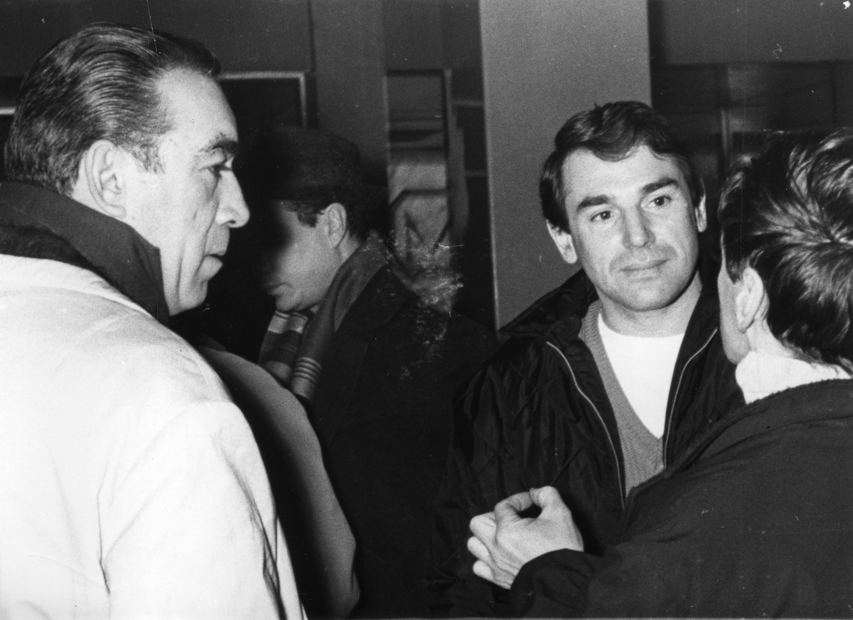 Entoni Kvin i Rober Osein u Beogradu, 1969.foto: Stevan Kragujević (po odobrenju kćerke Tanje Kragujević)